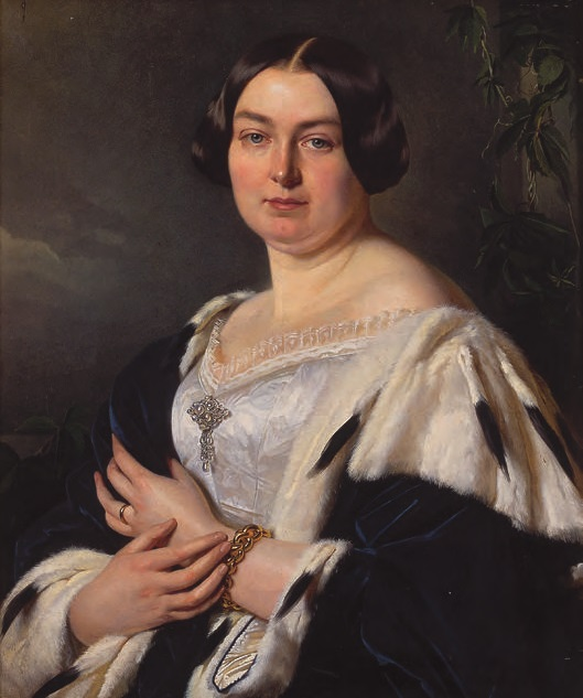 Katharina, als Tochter des Fürsten Karl Albrecht III. zu Hohenlohe-Waldenburg-Schillingsfürst